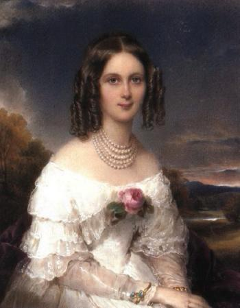 Leonia z Potockich Lanckorońska